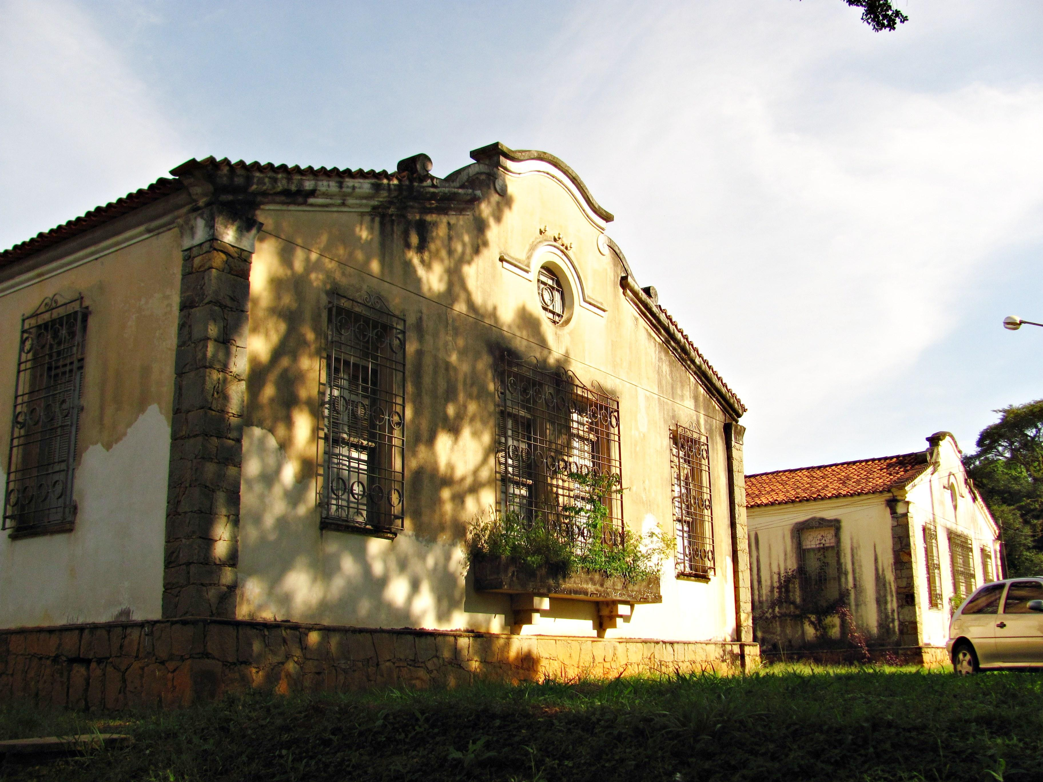 Um dos edifícios do Complexo Hospitalar do Juqueri